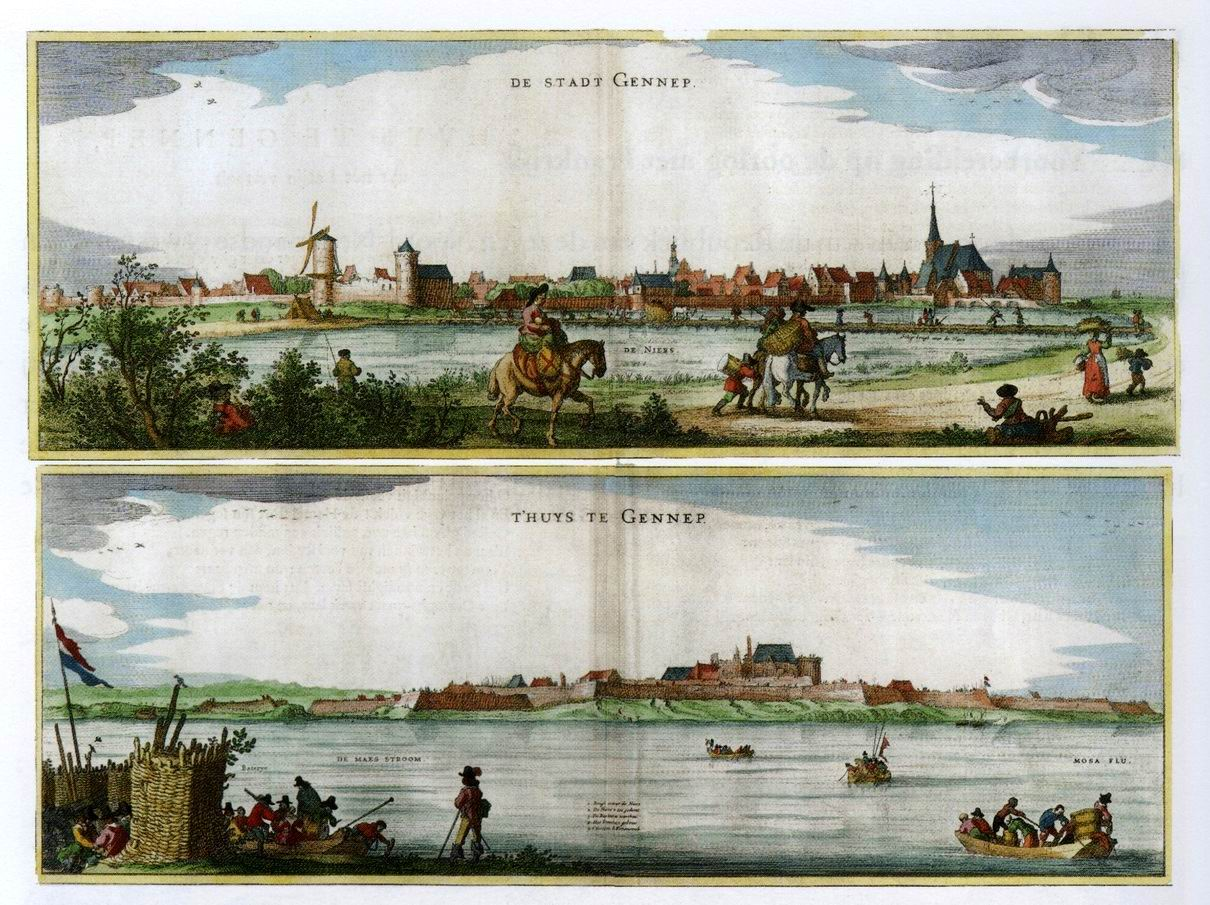 title(s): De Stadt Gennep & t'Huys te Gennep